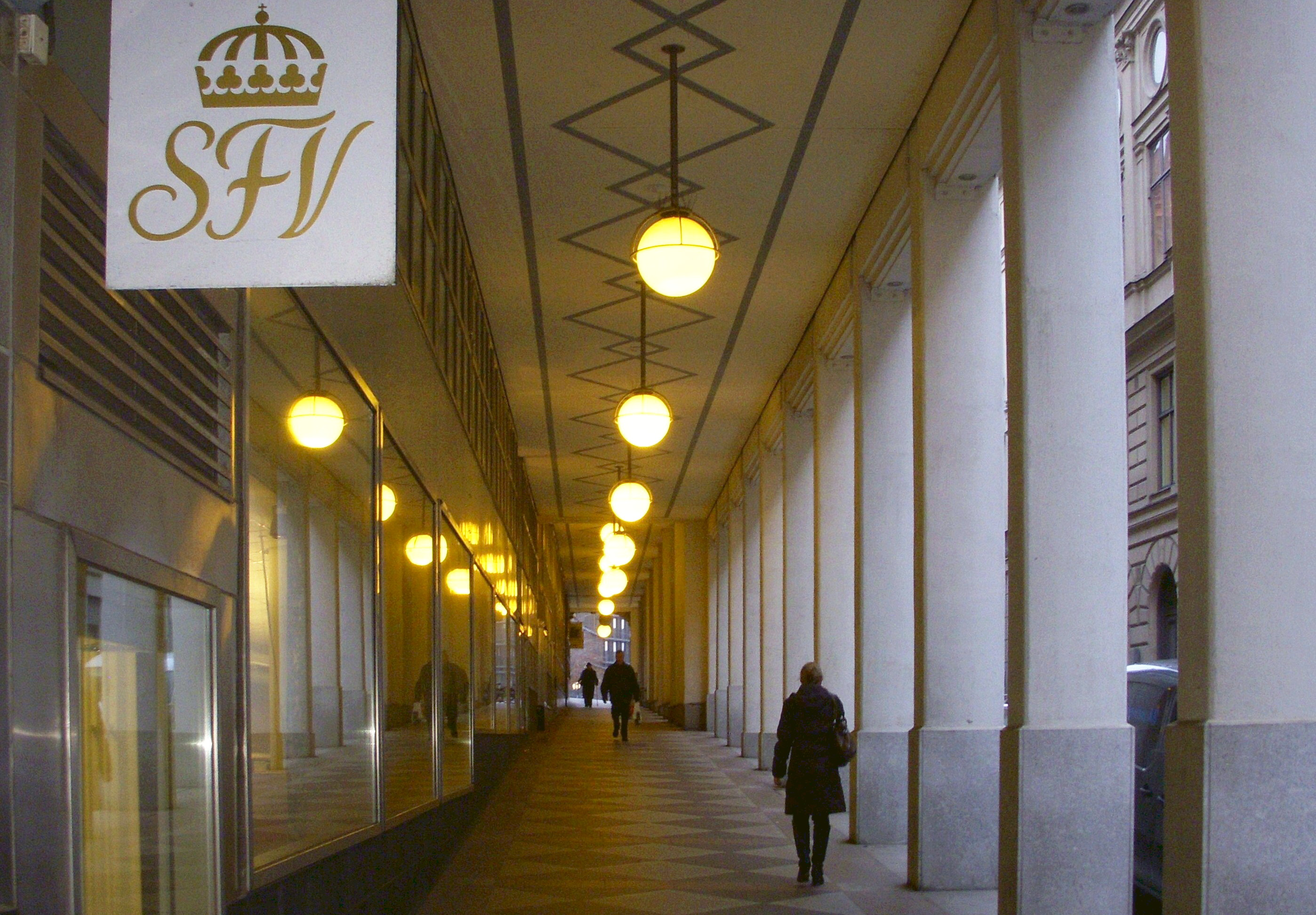 Jakobsgatans arkader i Stockholm